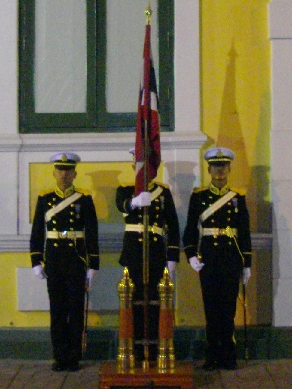 หมู่เชิญธงชัยเฉลิมพลของกรมนักเรียนนายเรือรักษาพระองค์ โรงเรียนนายเรือ ก่อนเข้าริ้วกระบวนเชิญพระศพสมเด็จพระเจ้าพี่นางเธอ เจ้าฟ้ากัลยานิวัฒนา กรมหลวงนราธิวาสราชนครินทร์ วันที่ 15 พฤศจิกายน พ.ศ. 2551 (ถ่ายขณะตั้งแถวทหารที่ถนนกัลยาณไมตรี)